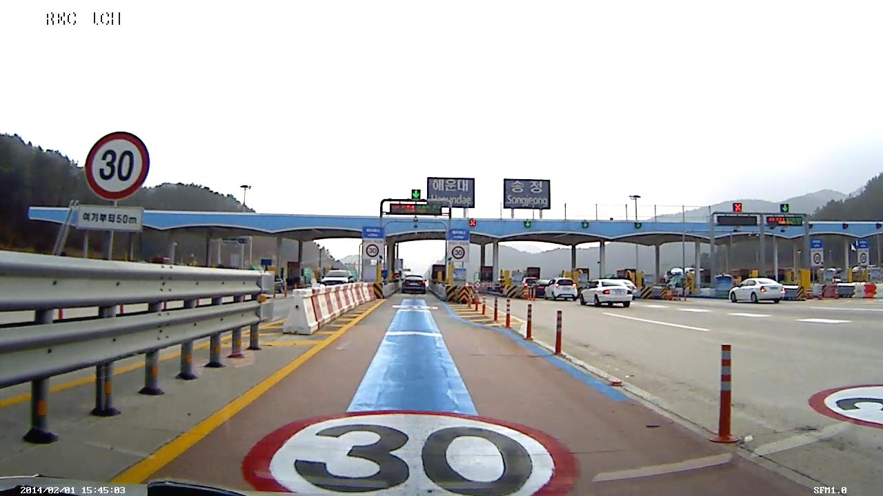 동해고속도로 해운대송정 요금소(해운대방향)입니다.